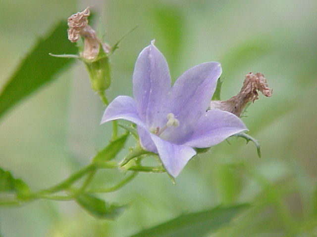 Species: Campanula lasiocarpa Family: Campanulaceae Image No. 1